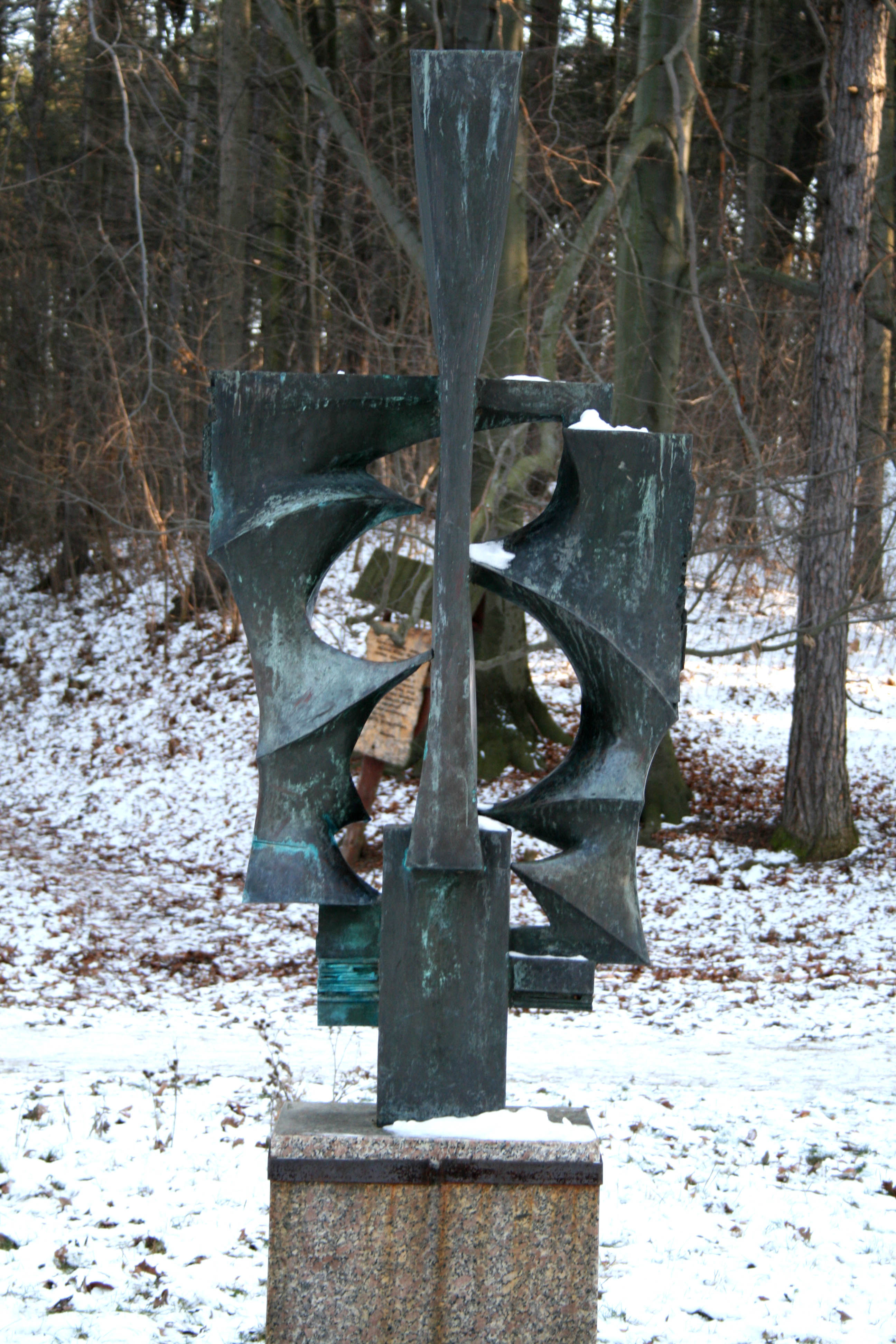 Autorom bronzoovej plastiky na trenčianskej Brezine je sochár Jozef Fizel, 1970